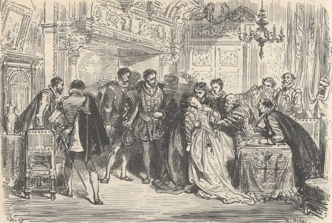 Ilustração de Gustave Doré para a edição de 1863 de "Dom Quixote" de Miguel de Cervantes